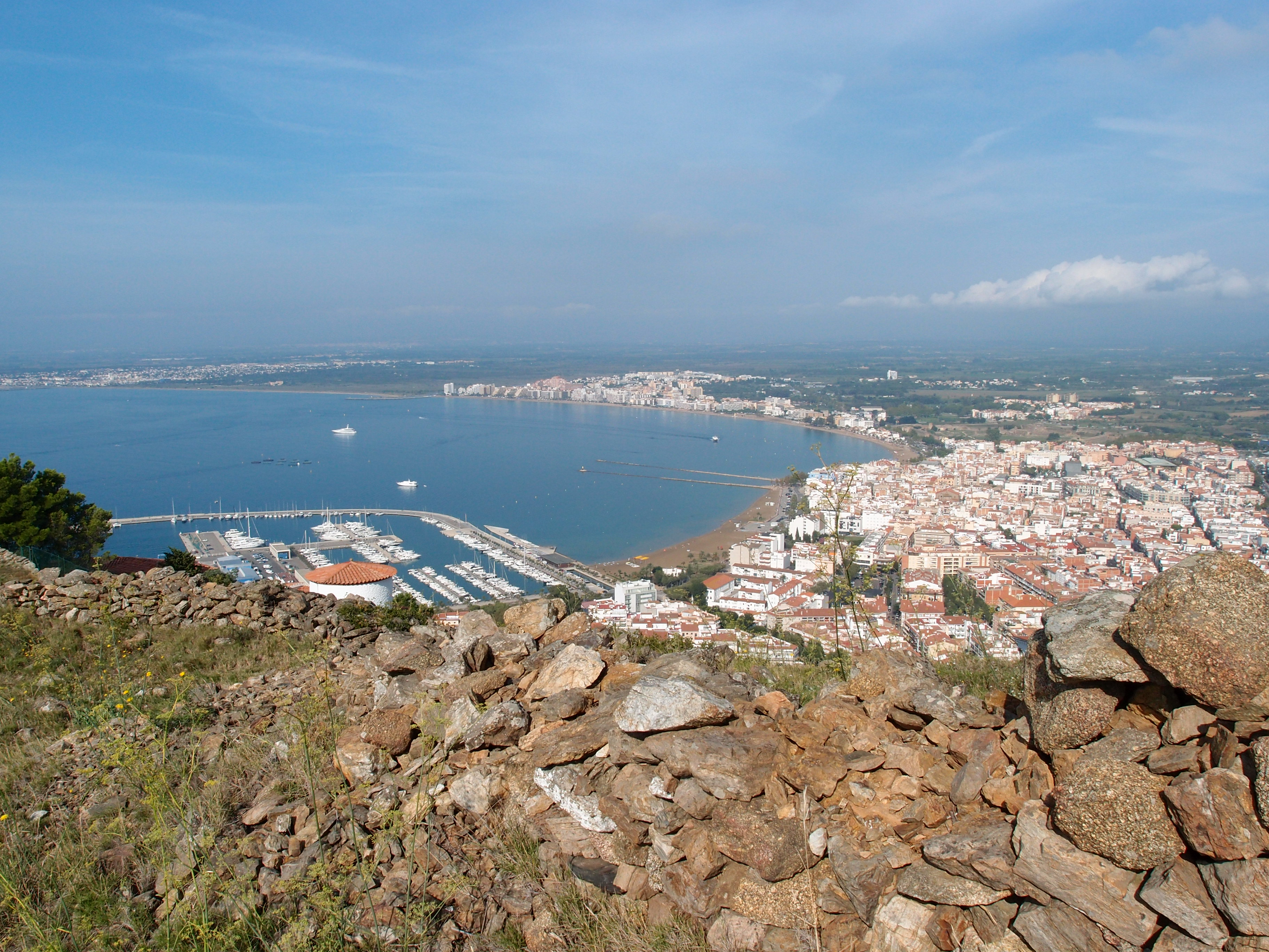 Aussicht vom "Castrum visigotic" in Roses (westgotisches Kastelle in Roses) Datum: 16.09.2014 Urheber: M. Pfeiffer alias Gordito1869 Quelle: privates Fotoarchiv des Urhebers